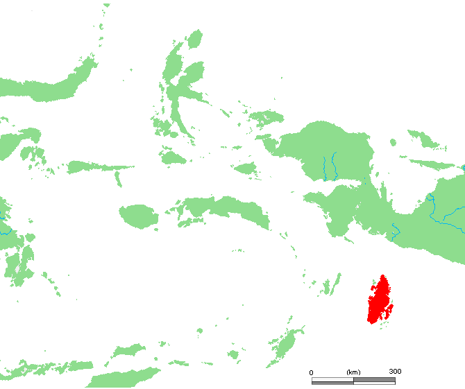 ID Aru.PNG